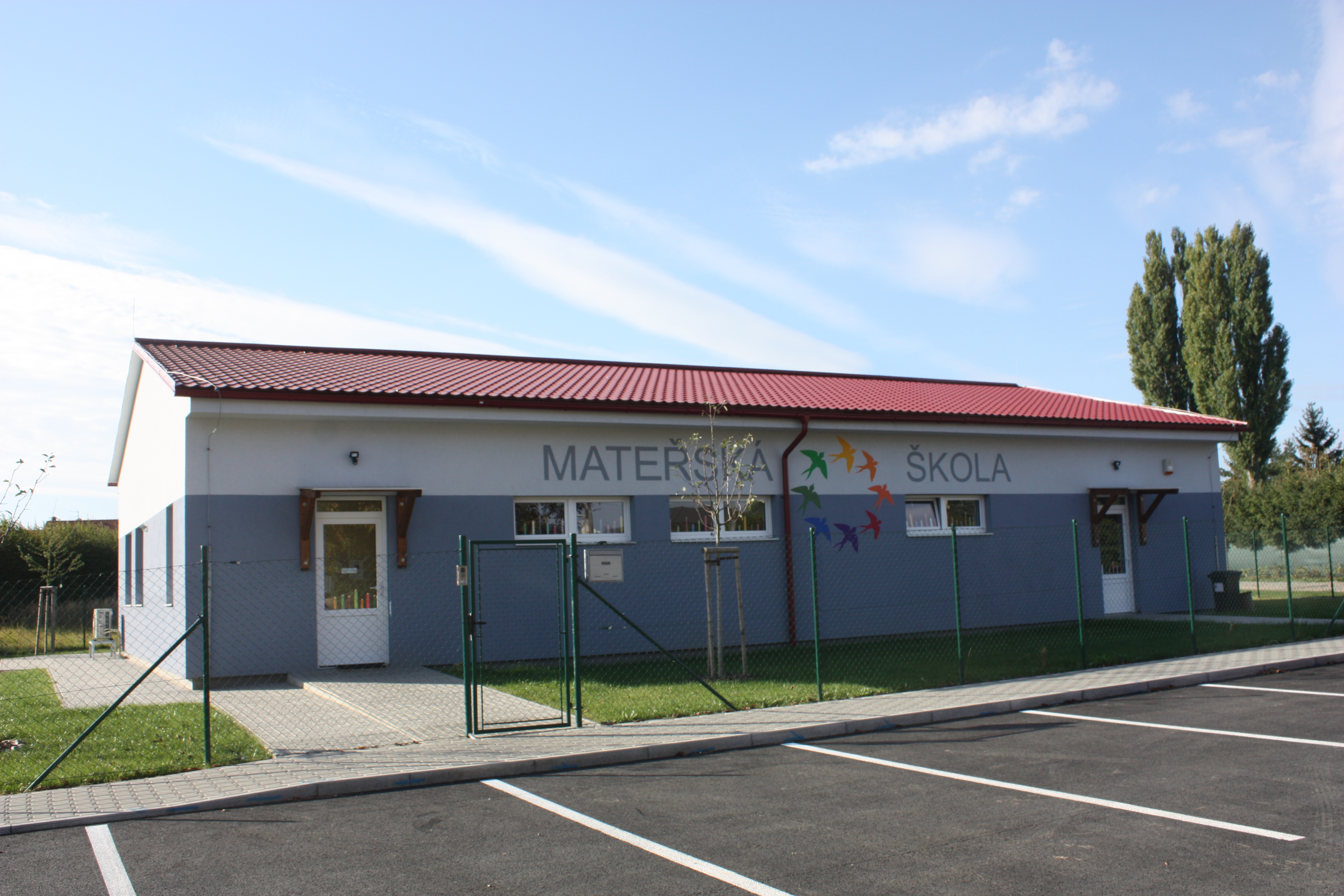 MŠ Ptice byla uvedena do provozu v září 2015